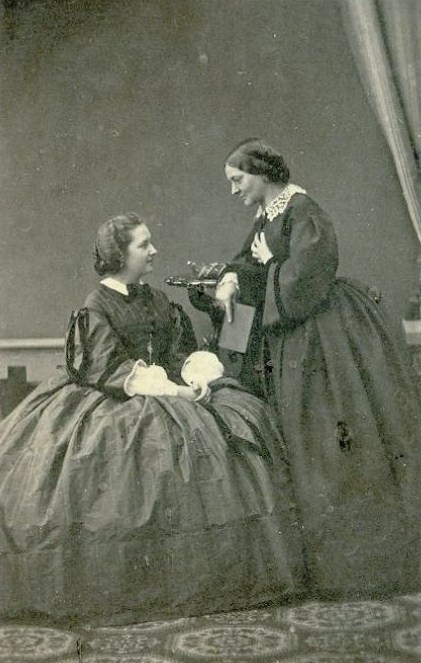 Карамзина Елизавета Николаевна и гр. Клейнмихель Екатерина Петровна, ур. кн. Мещерская